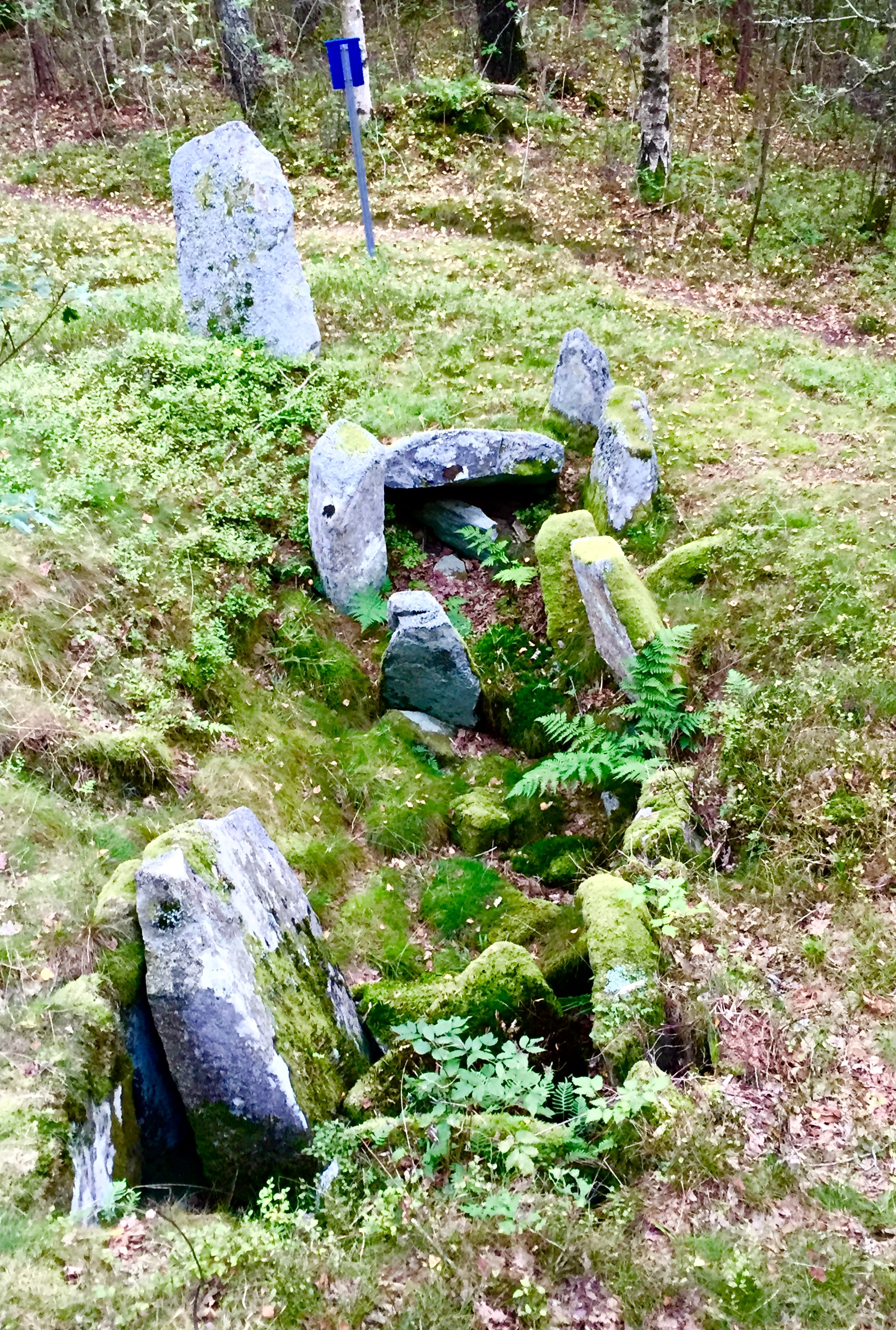 S:t Görans grav (Säve 130:1)